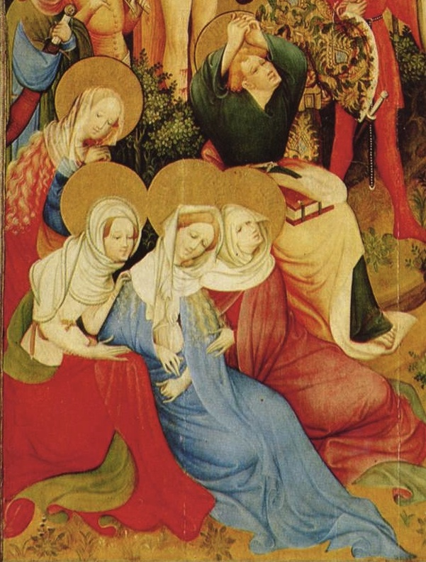 Détail du retable de Bad Wildungen